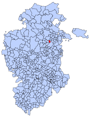 Aguilar de Bureba en Burgos